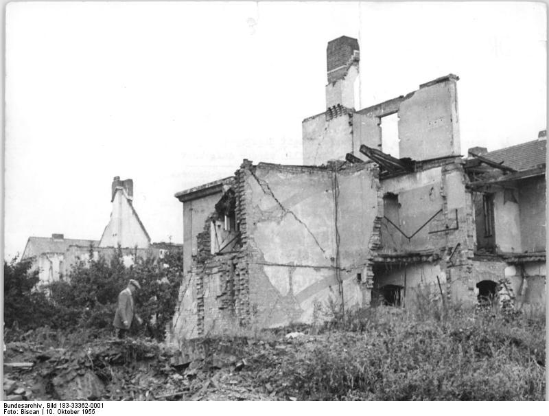 Magdeburg, Röntgenstraße, Ruinen Zentralbild Biscan 10 Mot. 10.10.1955 Kriegsschäden in gemeinsamer Arbeit überwunden 800 Wohnungen mit staatlicher Hilfe wieder aufgebaut Die Heimstätten-Baugenossenschaft in Magdeburg-Westerplan hat durch anglo-amerikanische Bomben 52 % ihres gesamten Bestandes an Wohnraum verloren. Weitere 40 %wurden mehr oder wemiger stark beschädigt. 4,8 Millionen staatliche Beihilfe und 1,5 Millionen eigene Mittel versetzten die Genossenschaft in die Lage, 800 ( acht null null) der zerstörten und beschädigten Wohnungen wieder instandzusetzen und 450 (vier fünf null) Wohnungen neu zu bauen. Dank der unermüdlichen Aufbauarbeit der Genossenschafter und der Kollegen des Patenbetriebes, des Schwermaschinenbaues "Ernst Thälmann", konnte besonders wirtschaftlich gearbeitet und große Summen eingespart werden. Das Finanzministerium und die Deutsche Investionsbank haben das geprüft und der Genossenschaft ihre Anerkennung ausgesprochen. UBz: So sah es nahezu in allen Strassen der Siedlung WESTERNPLAN aus: Eine Ruine reihte sich an die andere, wie hier in der Röntgenstrasse.